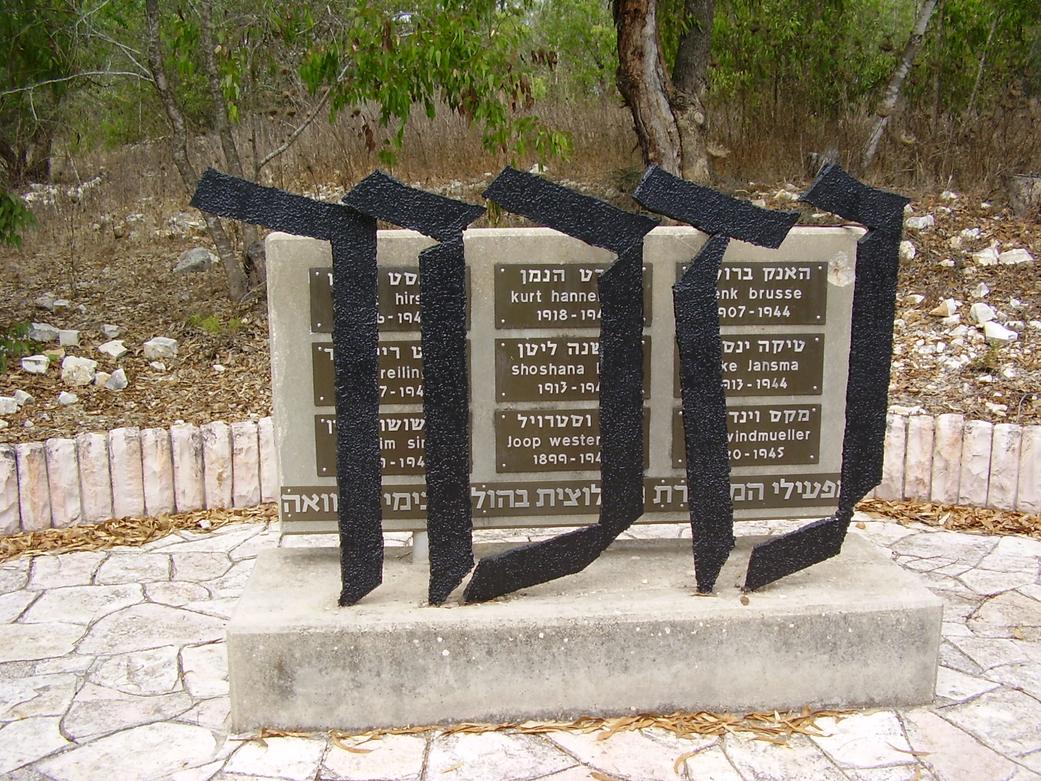 אנדרטת זיכרון ב"יער יופ וסטרויל", לחברי המחתרת ההולנדית שניספו במלחמת העולם השנייה רישיון נוצר על ידי משתמש:Avi1111 dr. avishai teicher